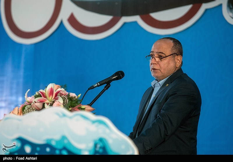 تورج دهقانی زنگنه